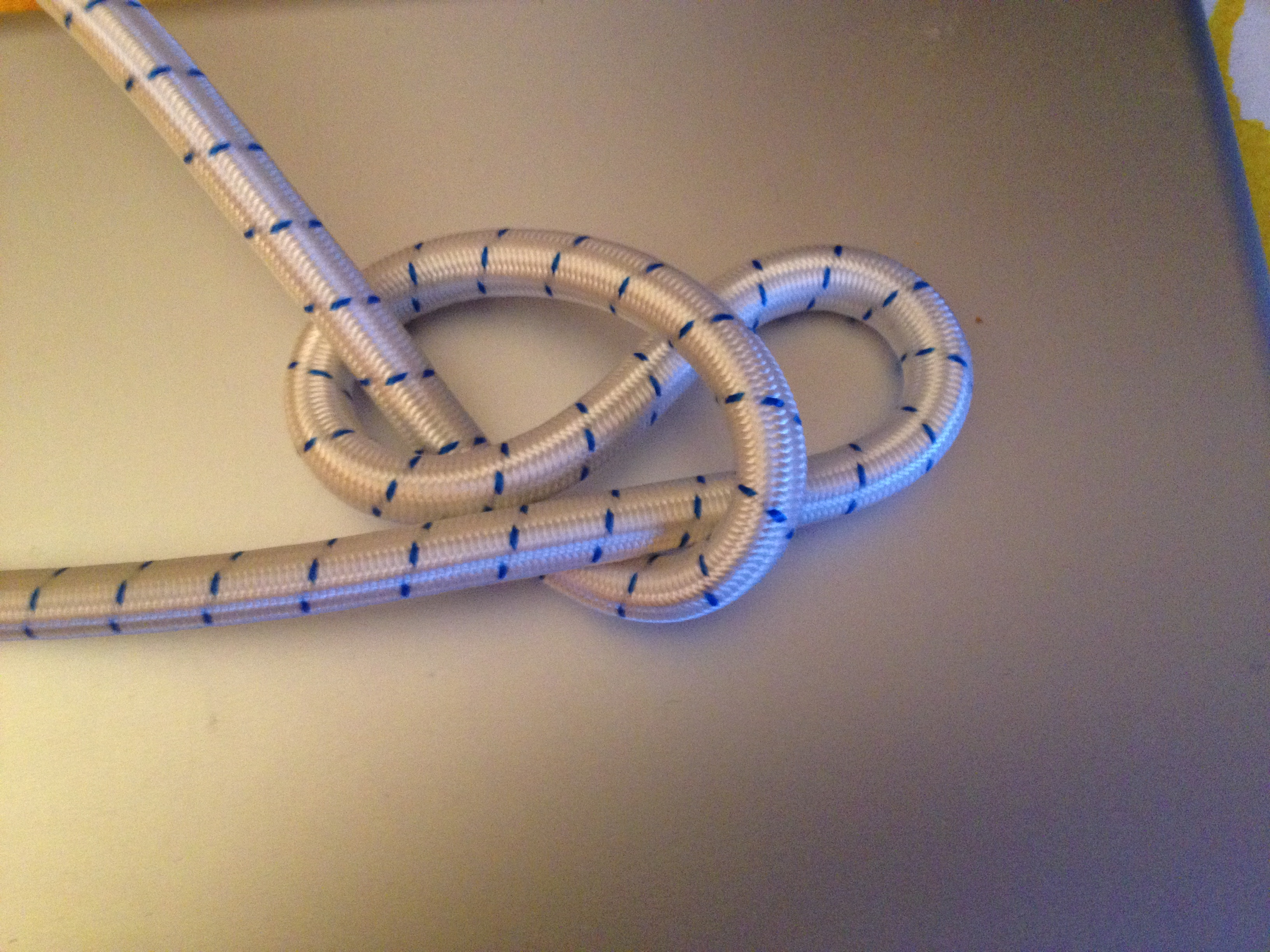 İp ortasında serbest uçlarla oluşturulan, sepet örgülü / saç örgülü görünüşlü cevizimsi bir düğümün 1. adımı: El altından ilmek, ilmek ucu aşağı doğru çıkacak.